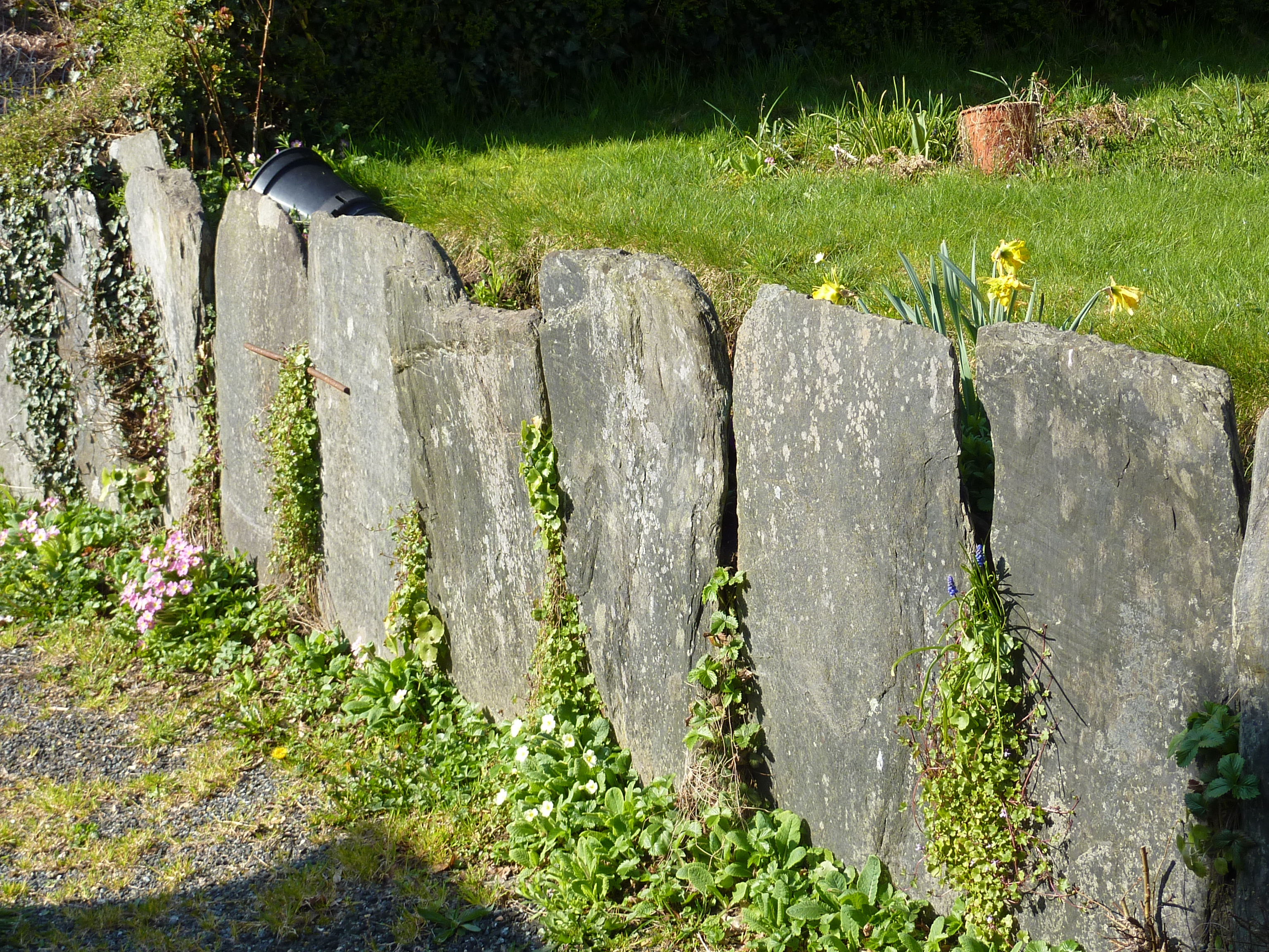 Talus en "pierres debout" (schistes ardoisiers) à Botmeur